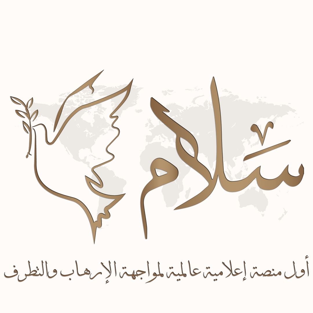 شعار منصة سلام الإعلامية الذي يتضمن رسالة المنصة